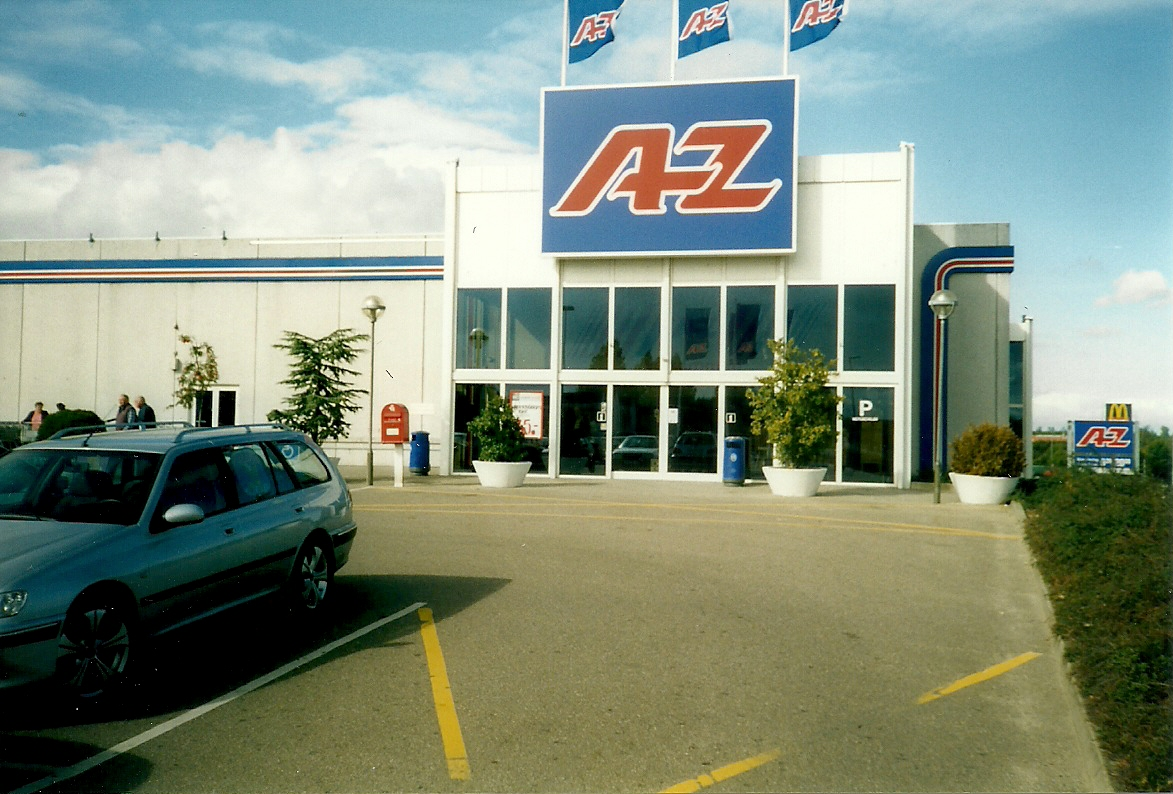 A-Z i Sønderborg